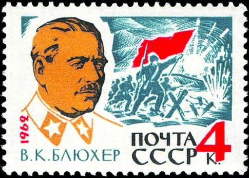 Почтовая марка СССР - Василий Константинович Блюхер, Маршал Советского Союза